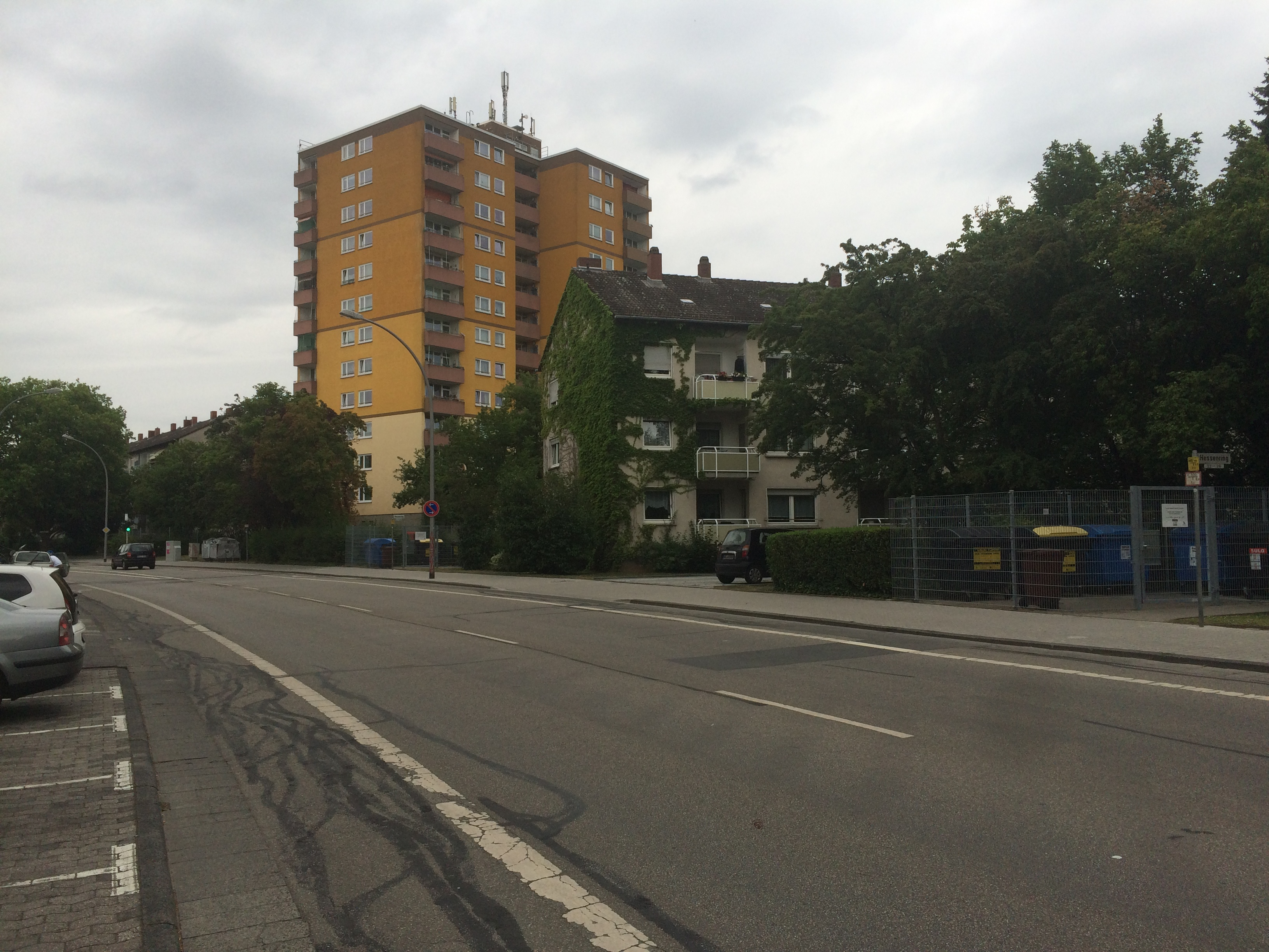 Haßloch (Rüsselsheim)